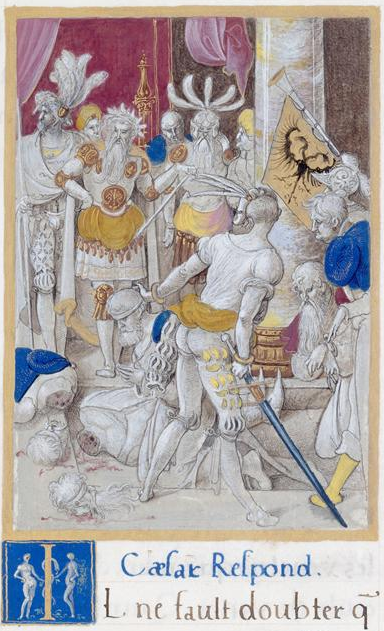 Cote cliché : 00-023305 N° d’inventaire : Ms764-folio34recto Fonds : Miniatures et enluminures Titre : Liber Tertius Caesaris : La Vengeance de César contre le Sénat de Vannes Description : Troisième livre des Commentaires de la Guerre Gallique de César par François Demoulins. Auteur : Godefroy le Batave (connu de 1516 à 1524) Date : 1520 Technique/Matière : enluminure, parchemin Hauteur : 0.205 m. Longueur : 0.130 m. Localisation : Chantilly, musée Condé